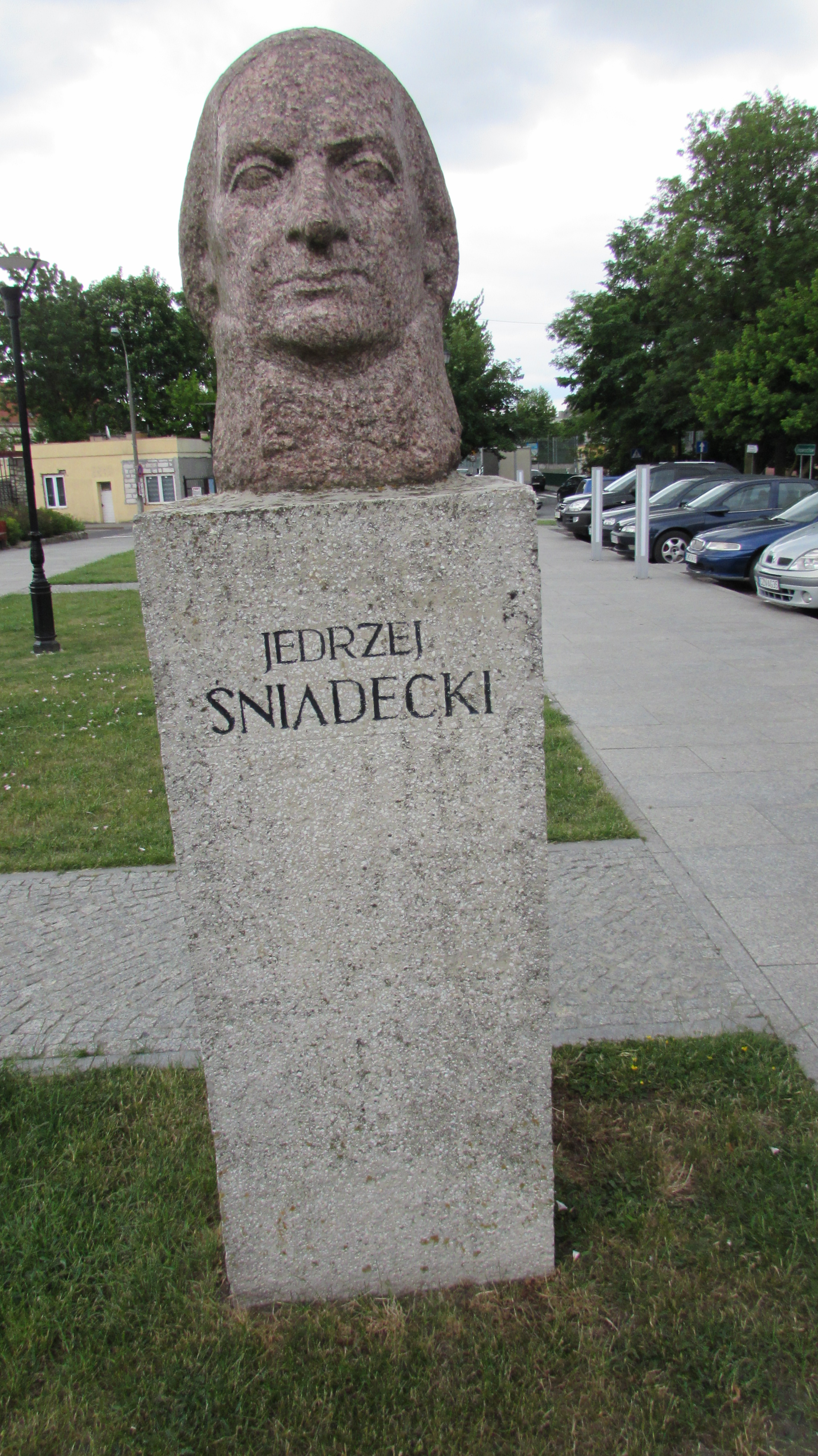 Jedrzej Sniadecki Denkmal In Znin